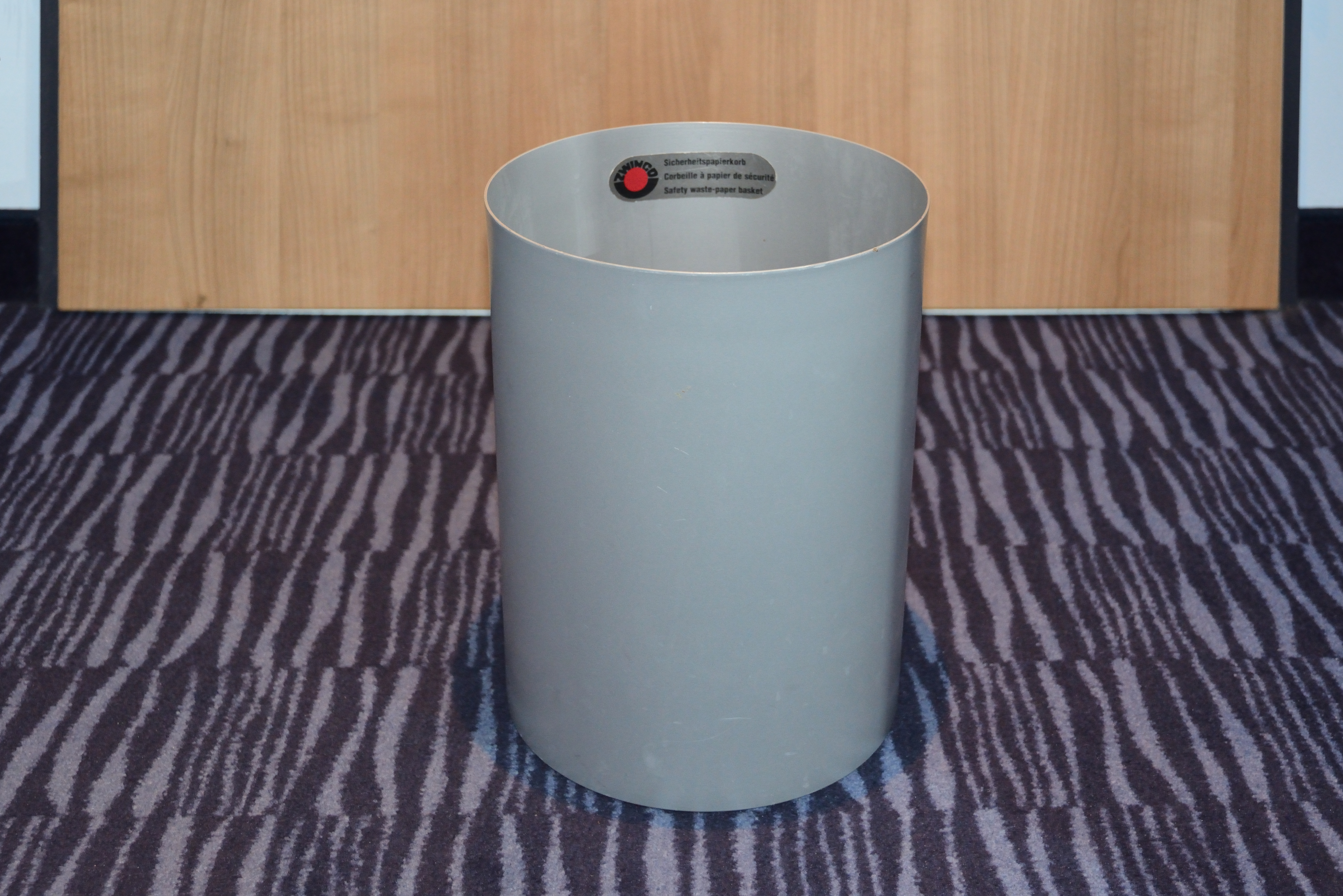 Impressionen aus dem Museum Europäischer Kulturen in BerlinHier: Ein Sicherheitspapierkorb aus Metall in einem Hotel.